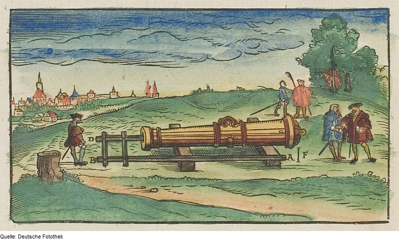 Original image description from the Deutsche Fotothek Ballistik & Kanone